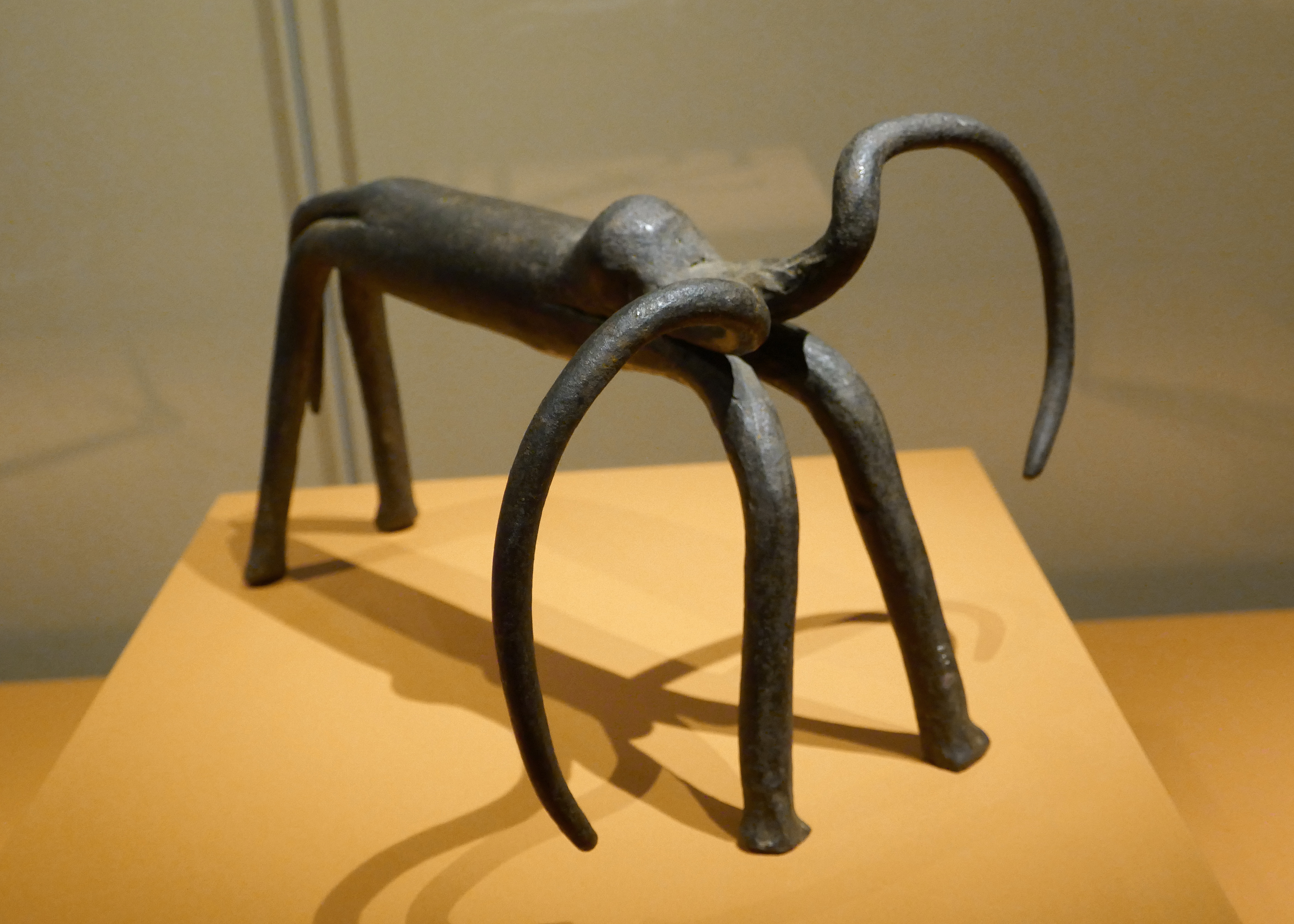 Figure bovine Artiste inconnu Royaume de Karagwe (Tanzanie) Milieu du 19e siècle Fer Collection Felix Objet présenté lors de l'exposition Frapper le fer. L'art des forgerons africains au musée du quai Branly Jacques Chirac.